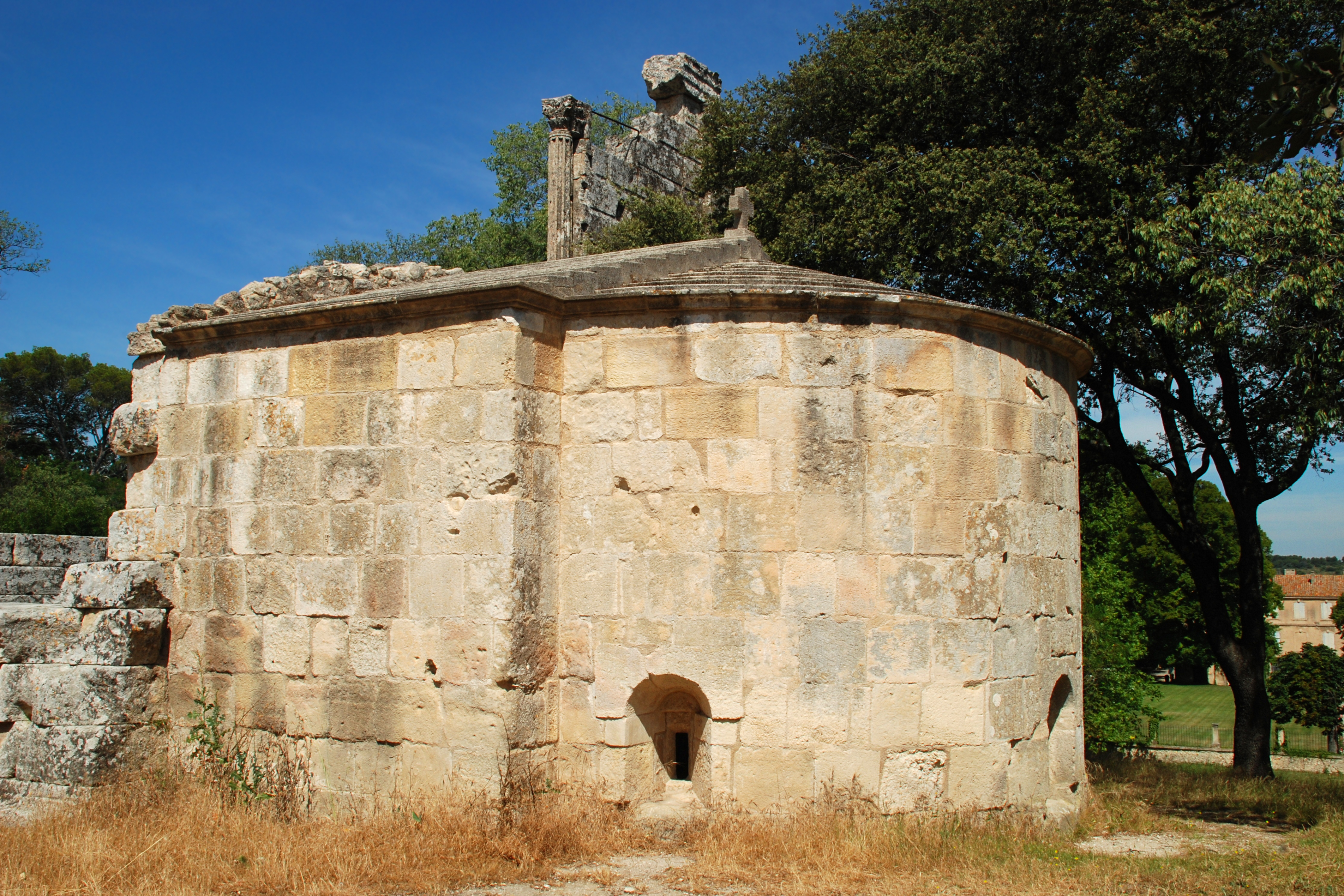 France - Provence - Bouches-du-Rhône - Vernègues - Chapelle Saint-Cézaire de Château-Bas